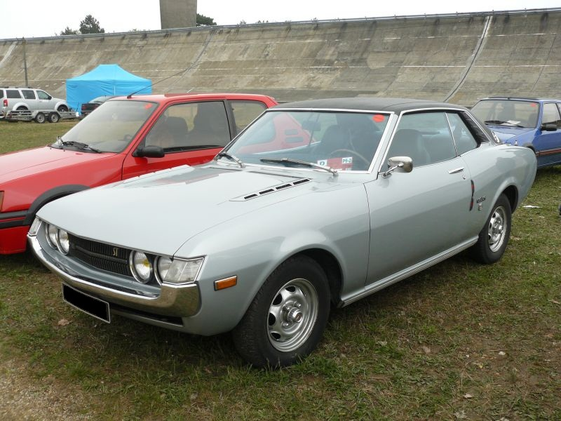 Français cadien: Montlhery Avril 2012 Toyota Celica Coupe 1600 ST (TA22).